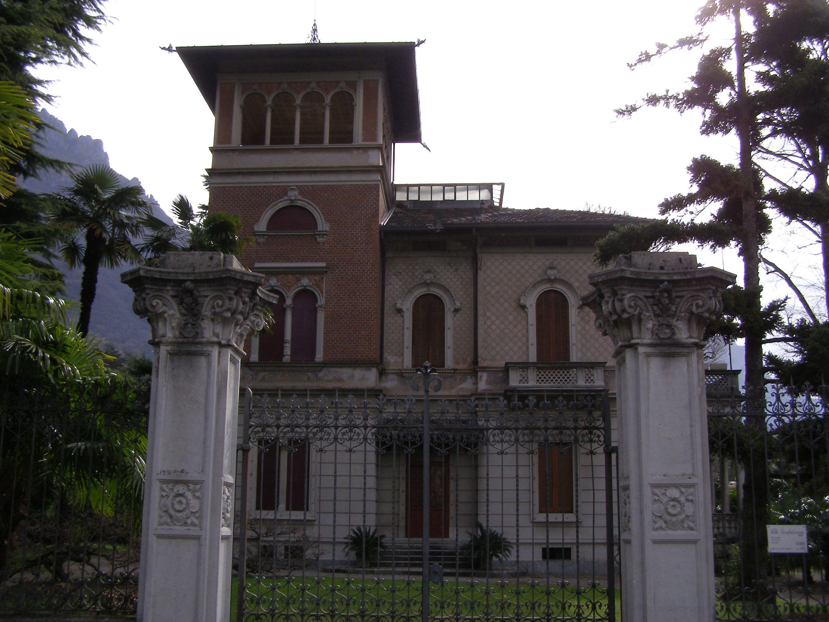 Mandello del Lario - Villa Confalonieri, Via Armando Diaz